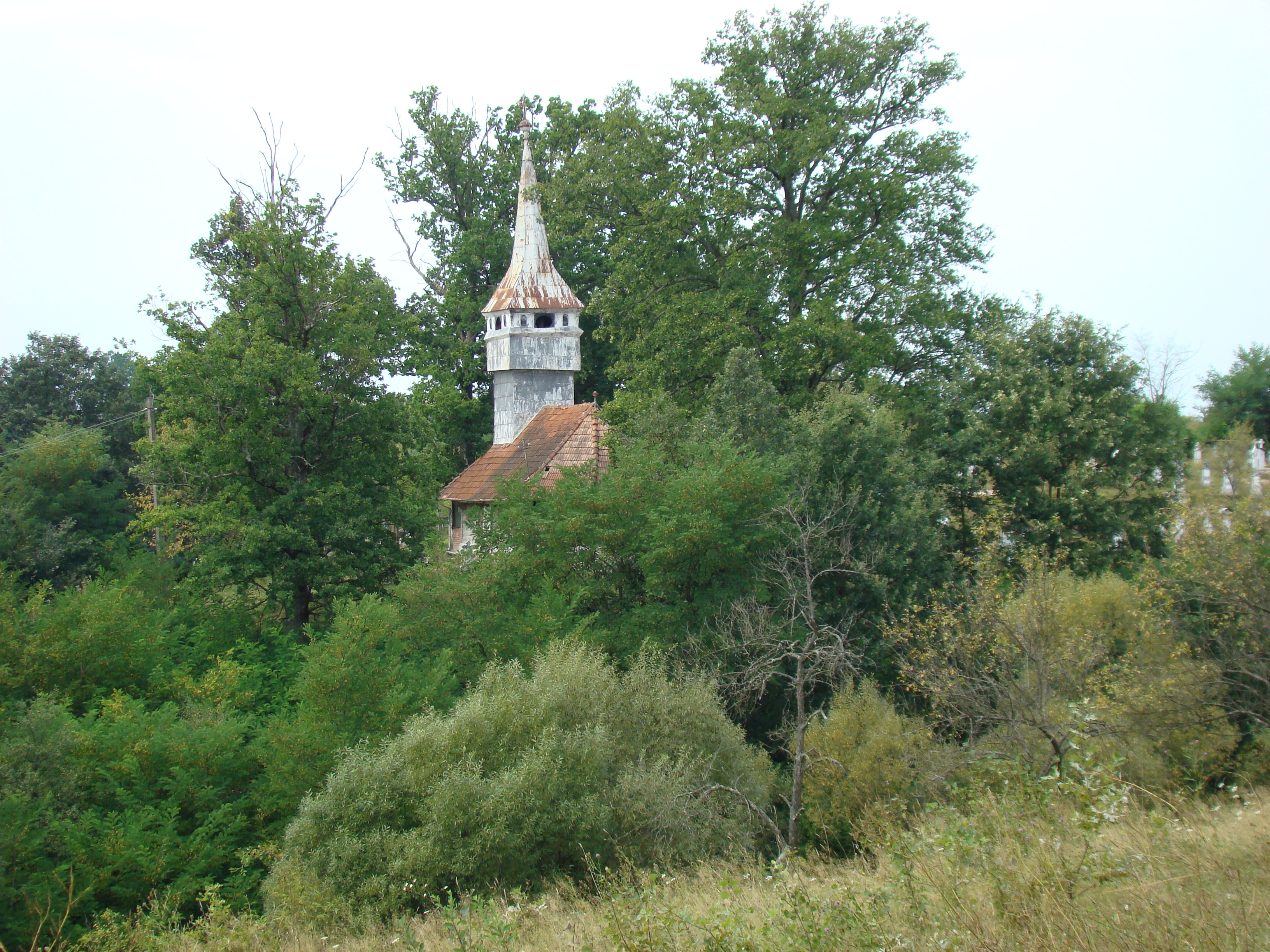 Biserica de lemn „Adormirea Maicii Domnului” din Tiulești-Hunedoara